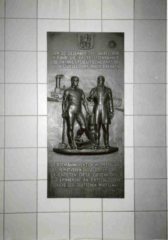 Gedenktafel zum Bau der Hauptstrecke der Düsseldorf-Elberfelder Eisenbahn-Gesellschaft im Hauptbahnhof von Düsseldorf (Nordtunnel), Werk des Bildhauers Emil Jungblut (*11. Juni 1888] in Düsseldorf; † 24. April 1955 ebenda)